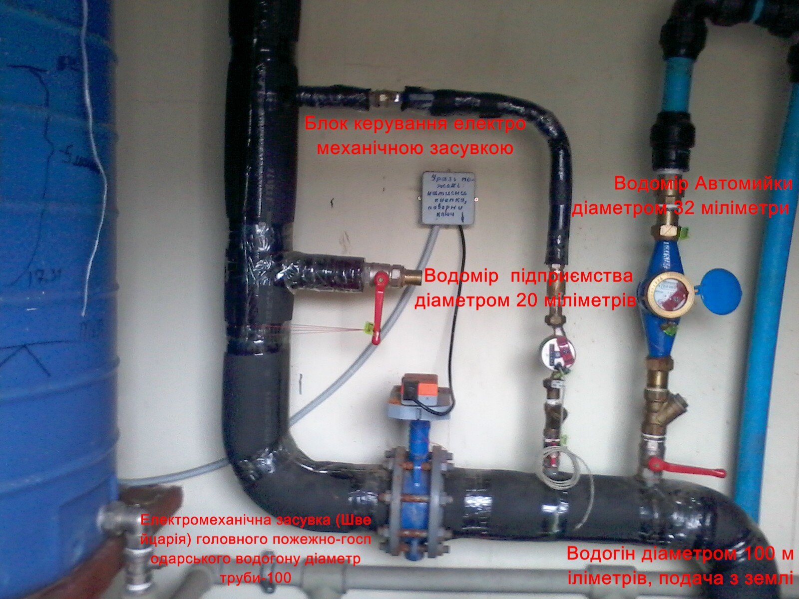 Пожежно-господарчий водогін